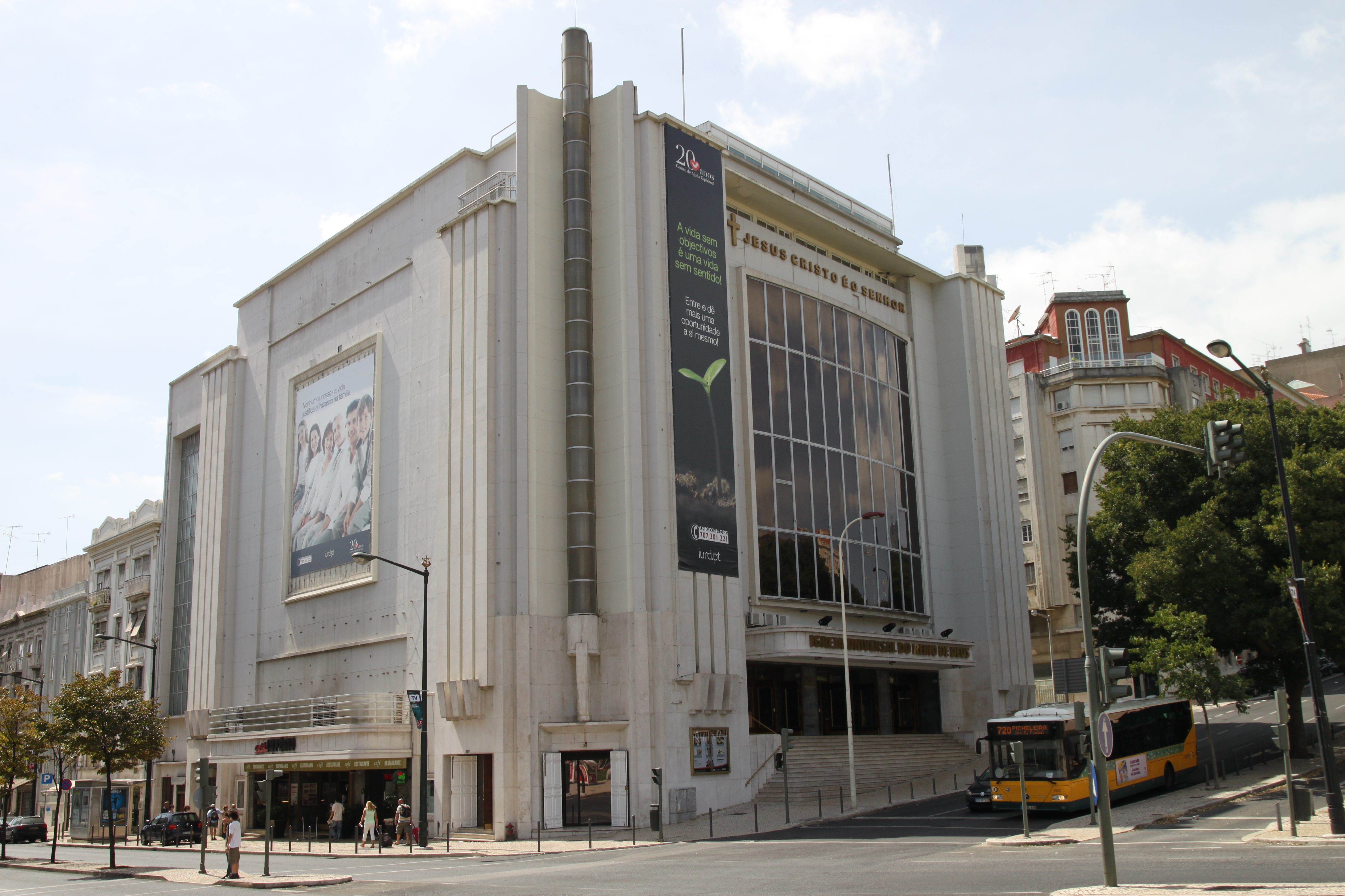 Igreja Universal do Reino de Deus Alameda, Lisboa. Former cinema Império until 1992.